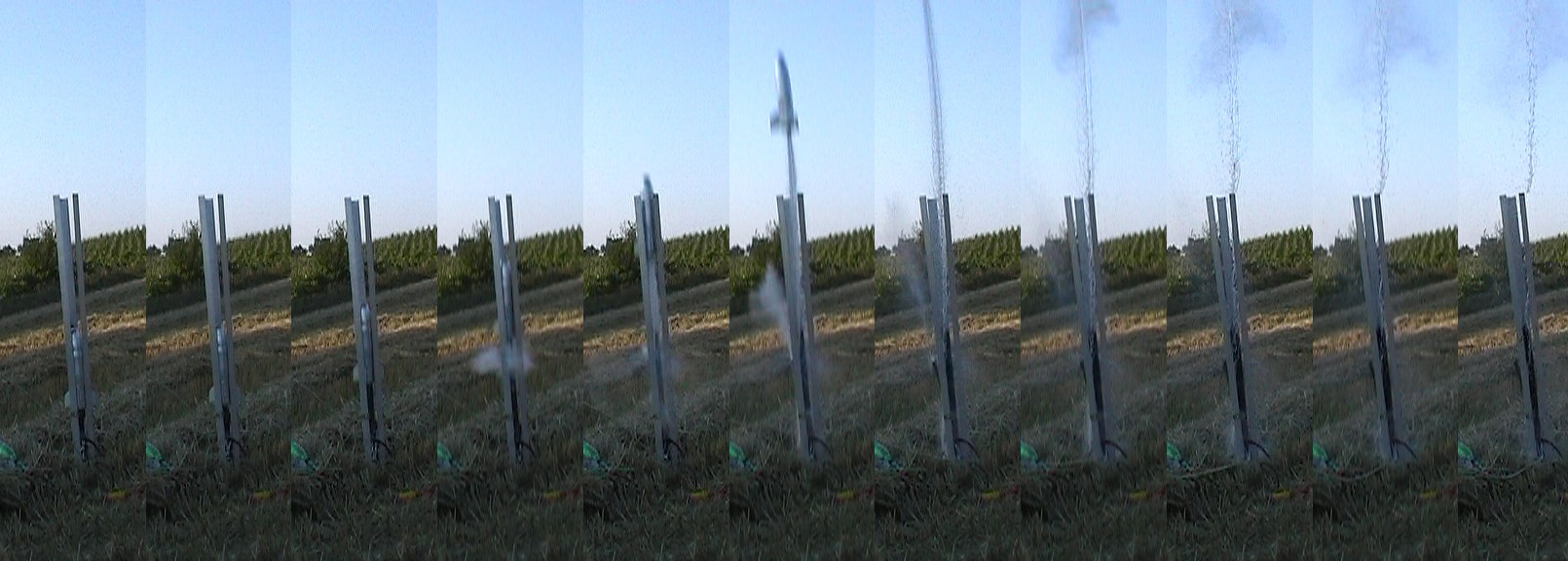 Il lancio di un razzo ad acqua, visto a 50fps. A water rocket launch by a 50fps view.